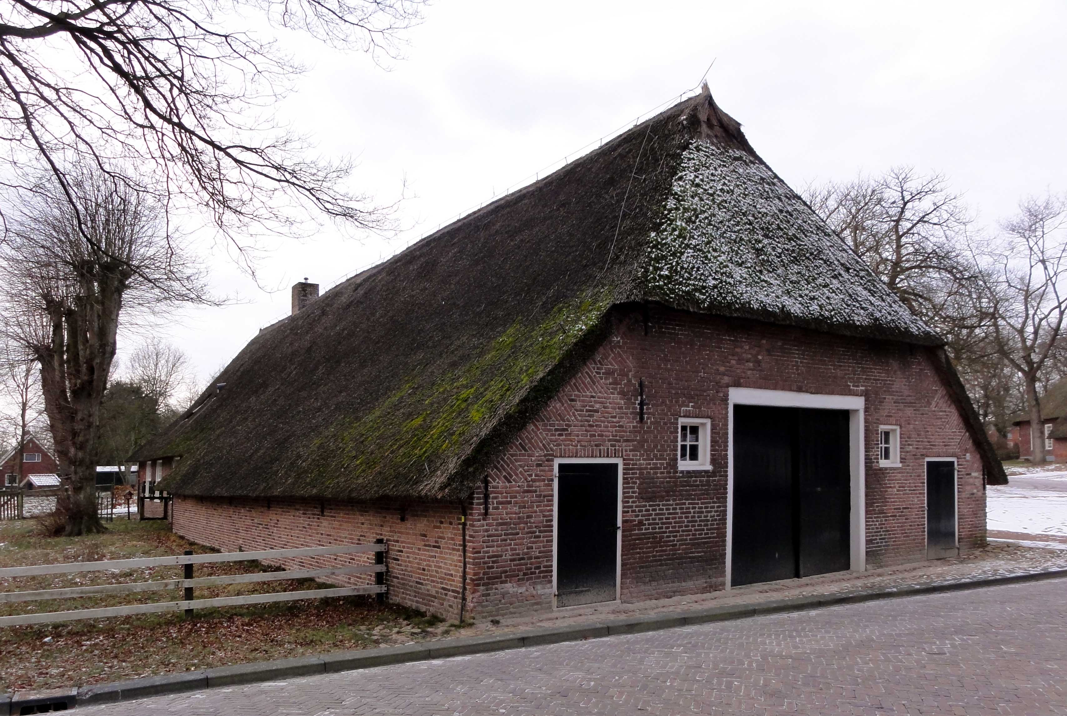 Het Bebinghehoes aan de Zuiderhoofdstraat in Exloo